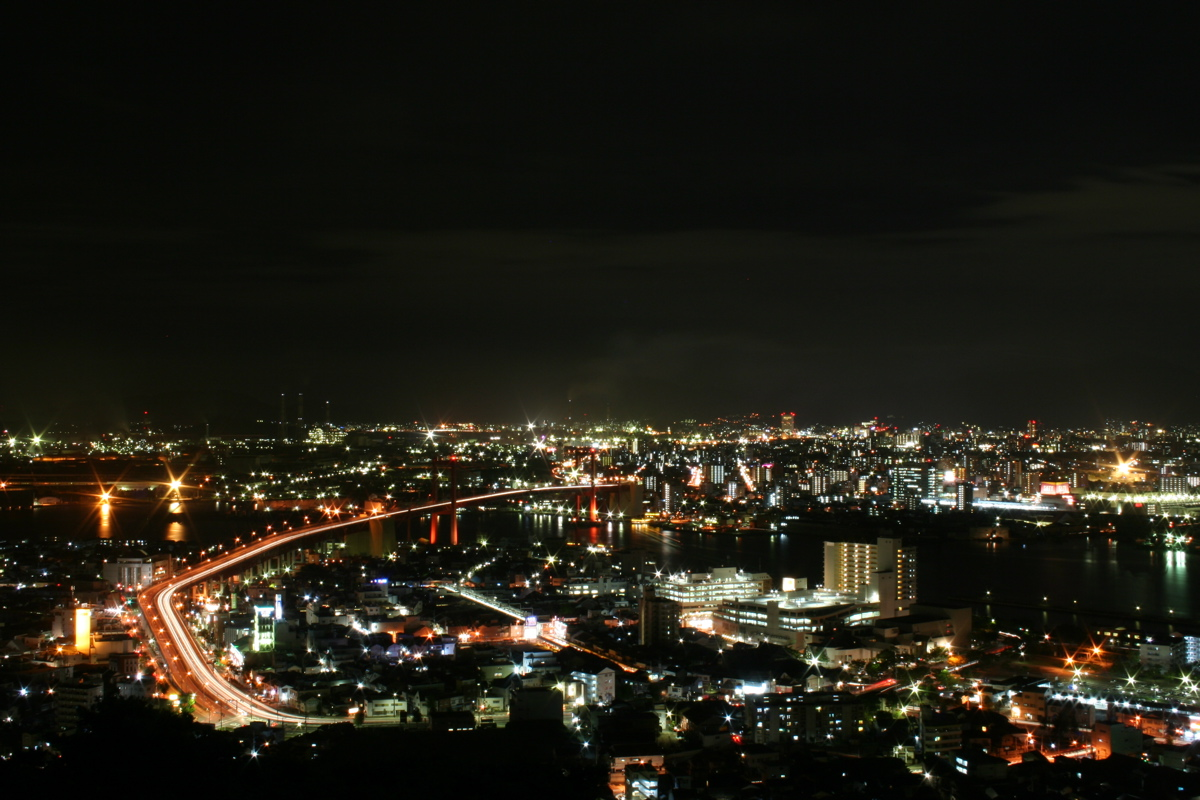 Wakato Bridge's nightscape from Mt.Takatoyama, Wakamatsu 北九州市若松区高塔山より若戸大橋の夜景